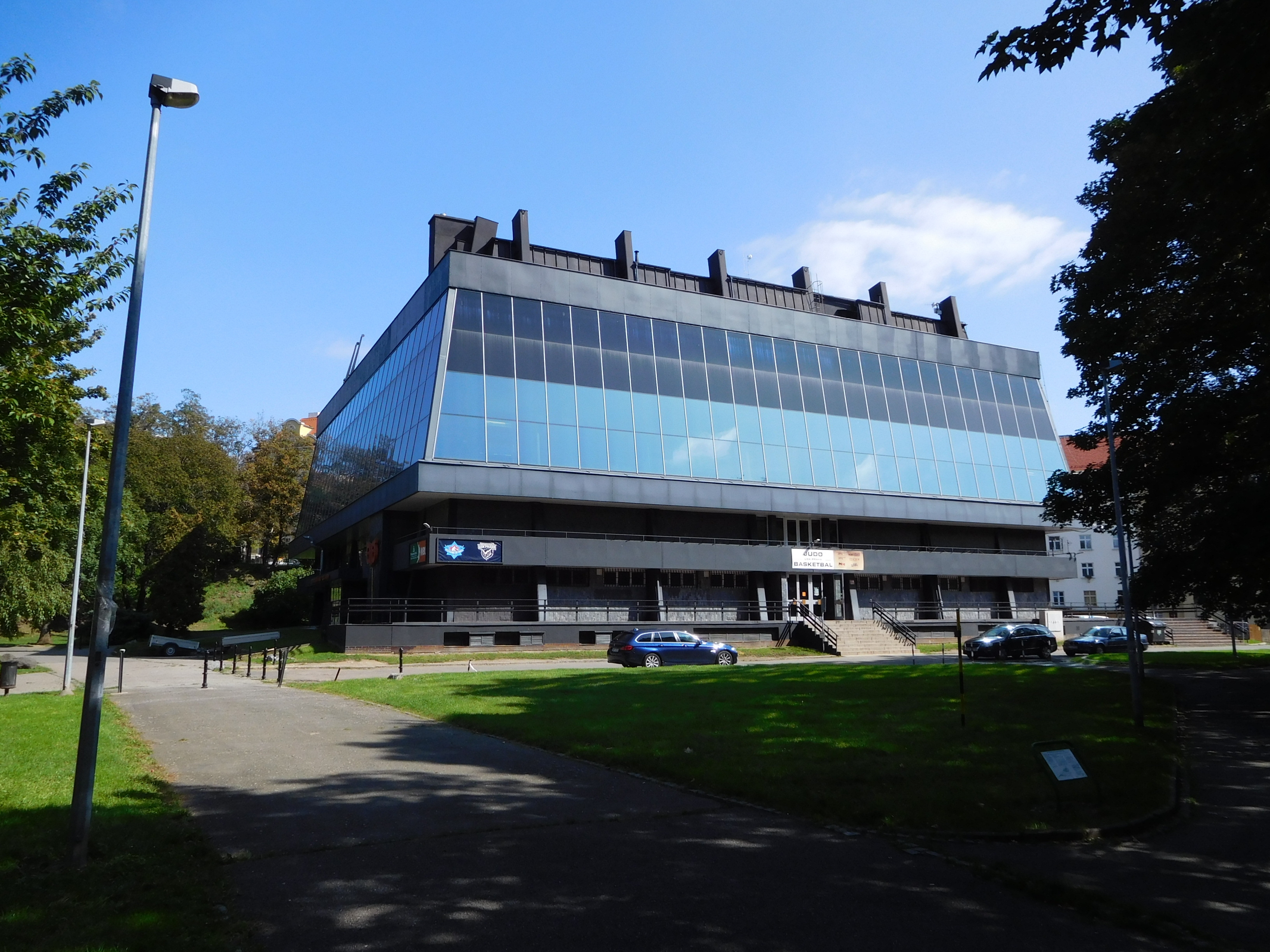 Praha - Vinohrady, Sportovní hala Folimanka